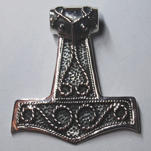 hopeinen thorin vasara